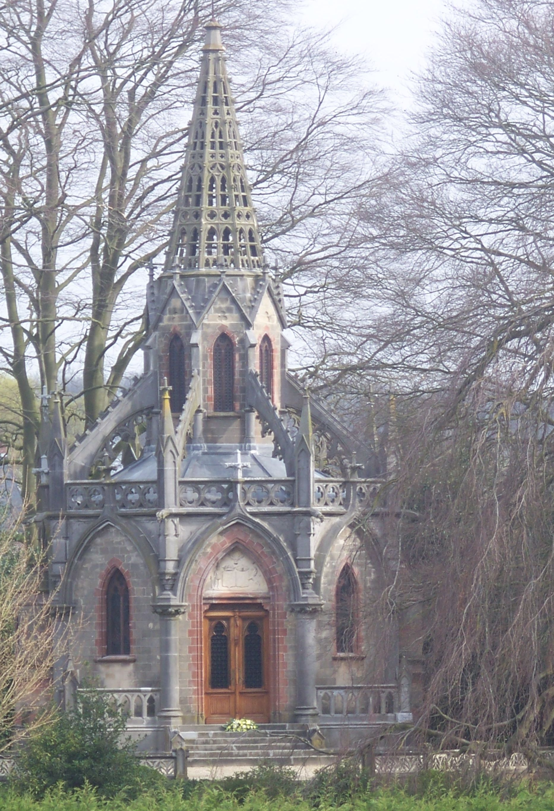 Chapelle néogothique octogonale avec flèche et arc boutants, entourée de hêtres séculaires.